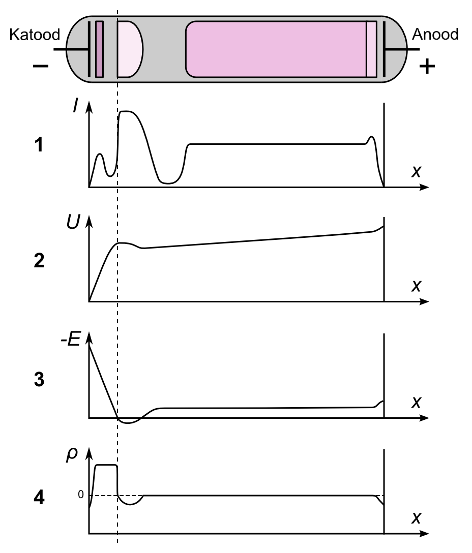 Silindrilises anumas tekitatud huumlahenduse karakteristlike suuruste sõltuvus teljesihilisest koordinaadist.